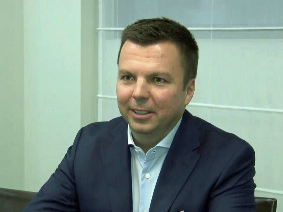 Marek Falenta, przedsiębiorca.